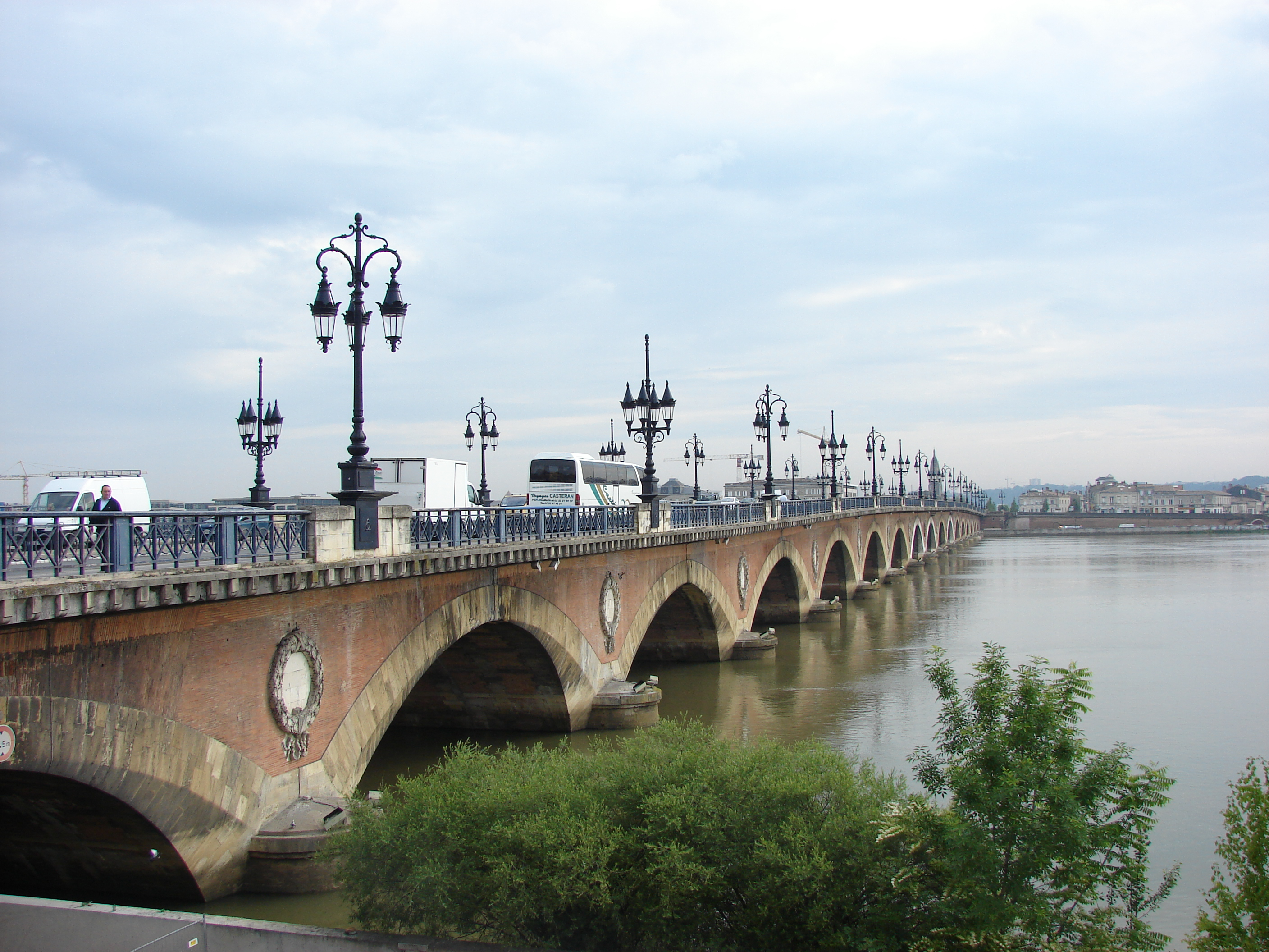 Pont de Pierre; Garonne, Bordeaux, Aquitaine, France